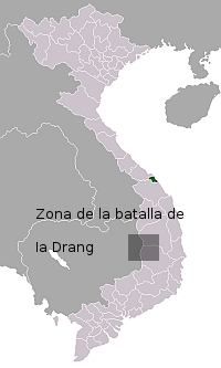 Mapa de la Batalla de Ia Drang, Vietnam del Sur, 1965.